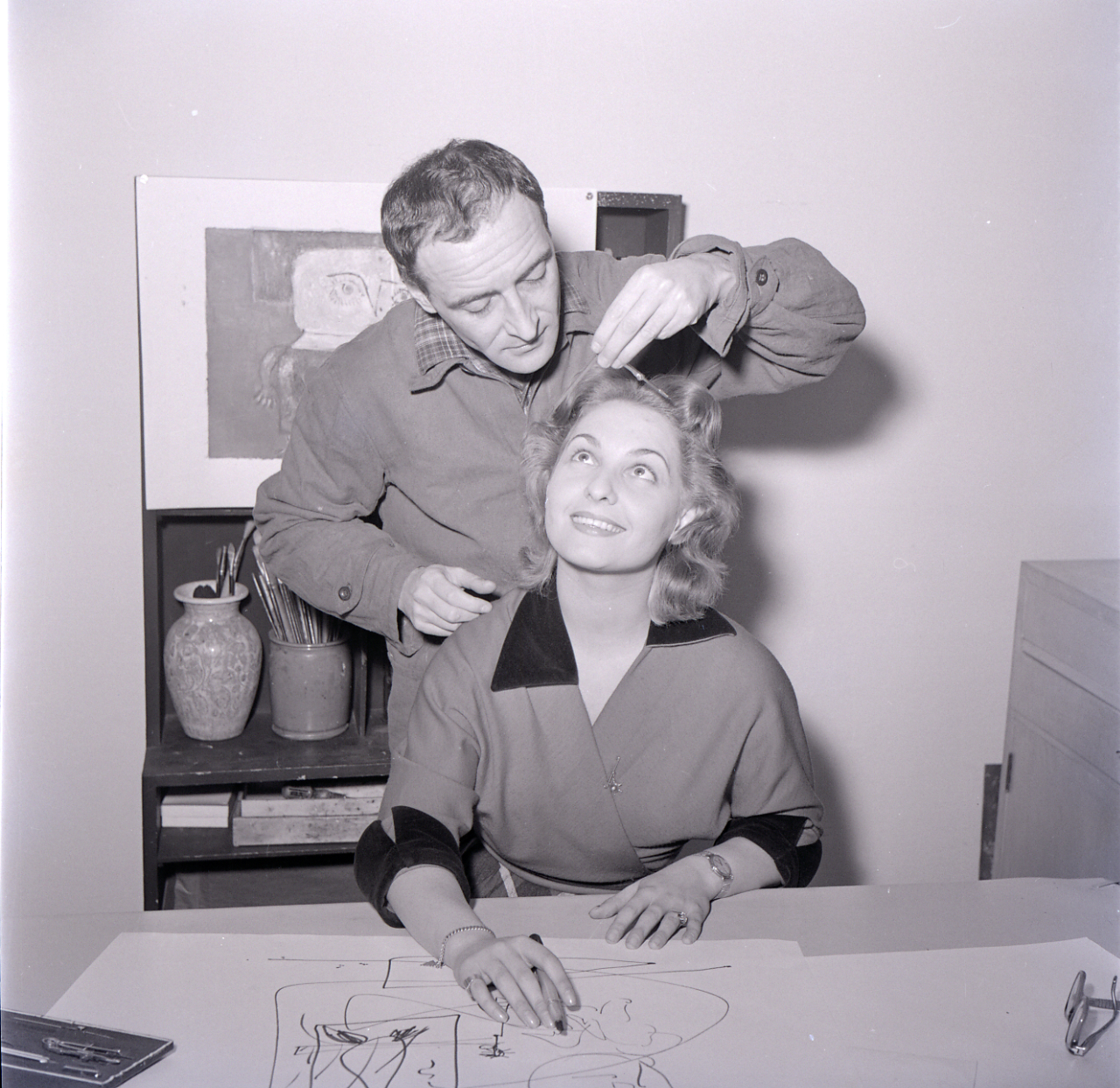 Servizio fotografico : Italia, 1982 / Paolo Monti. - Buste: 20, Fototipi: 22 : Negativo b/n, gelatina bromuro d'argento/ pellicola ; 6x6. - ((Serie costituita da 20 buste di carta, tenute insieme da una graffetta, identificate con i nn.: R4383, R4384, R4385, R4386, R4387, R4388, R4389, R4390, R4391, R4392, R4393, R4394, R4395, R4396, R4397, R4398, R4399/4402, R4403, R4404, R4405. - Sulla busta R4383: "Manzi"